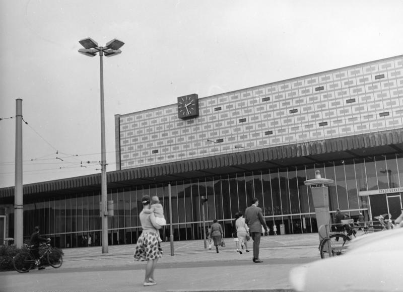 Stadtaufnahmen von Braunschweig neuer Bahnhof